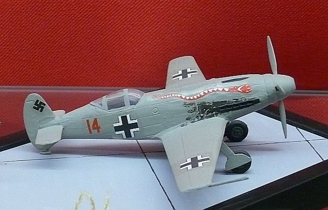 Me 209 V4 Modell, eigenes Bild, This pic must not be used in Germany, since presentation of swastica on a model is forbidden there